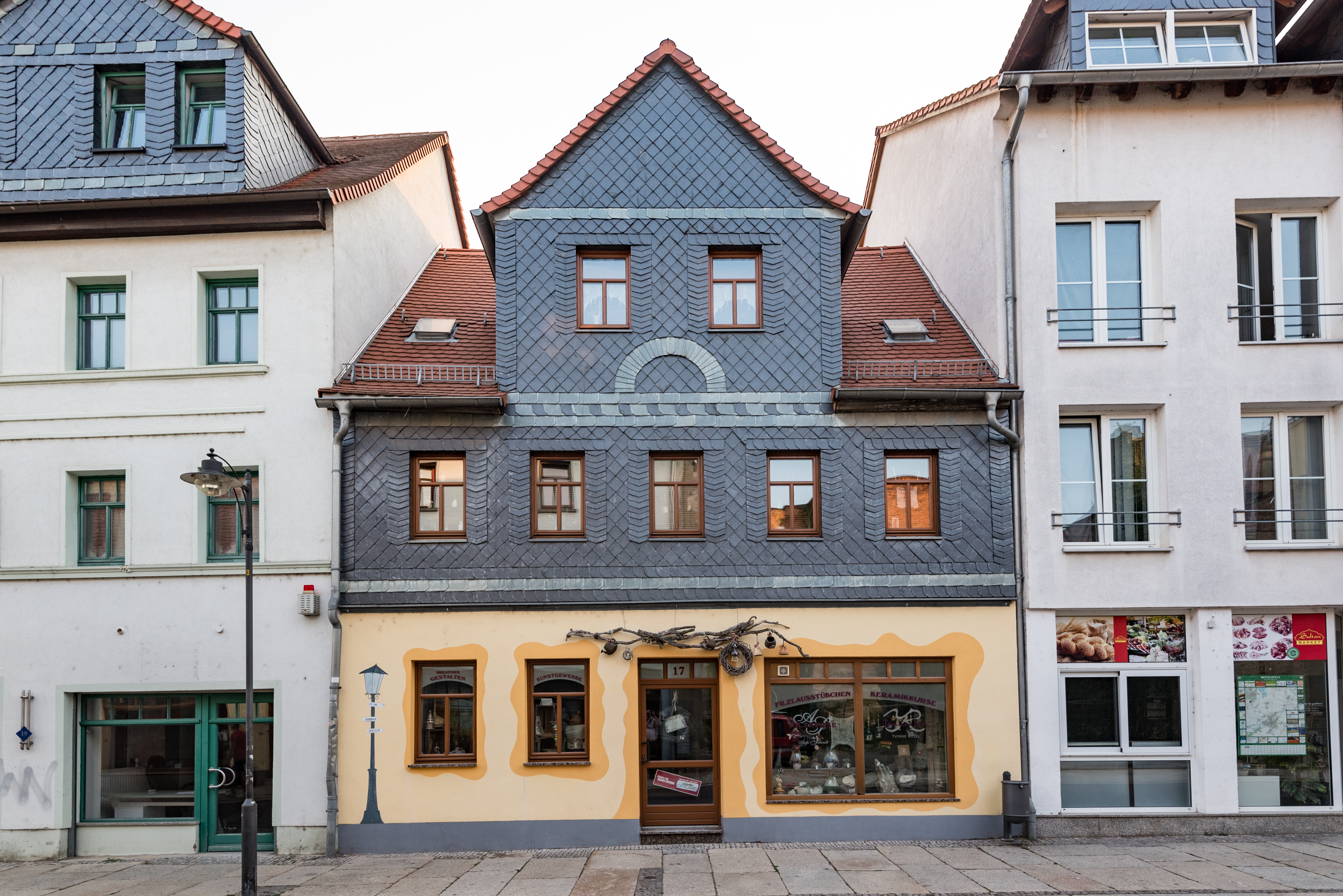 Weißenfels, Kleine Kalandstraße 17